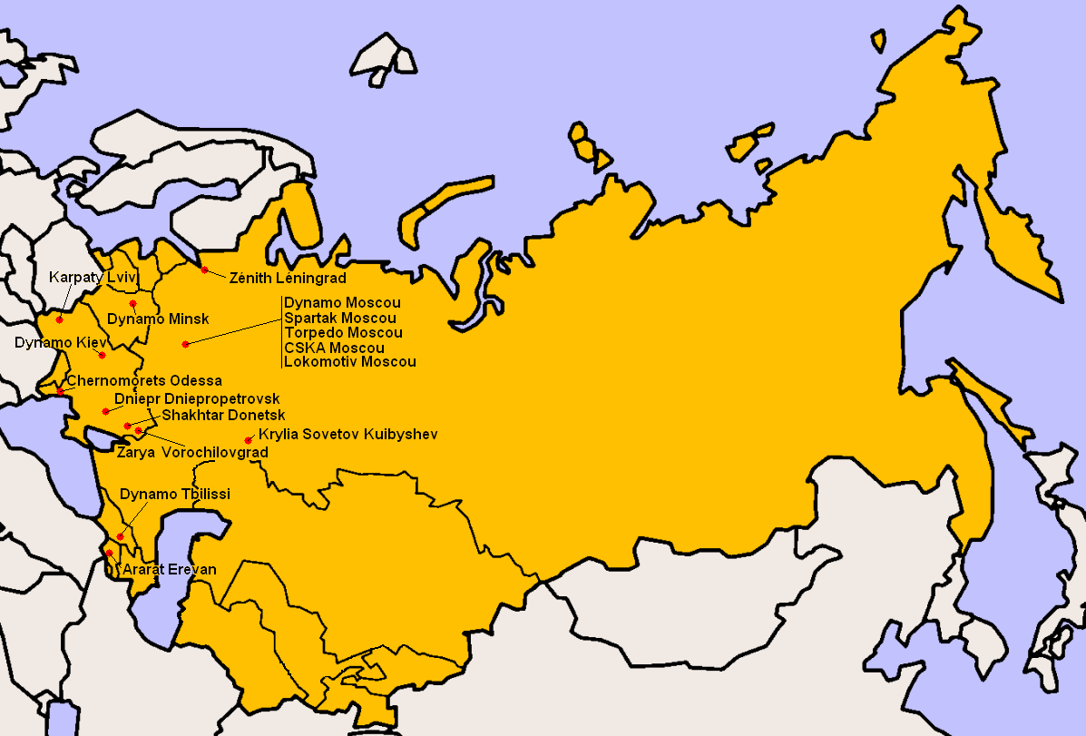 Clubs participants à la Division Supérieure 1976.